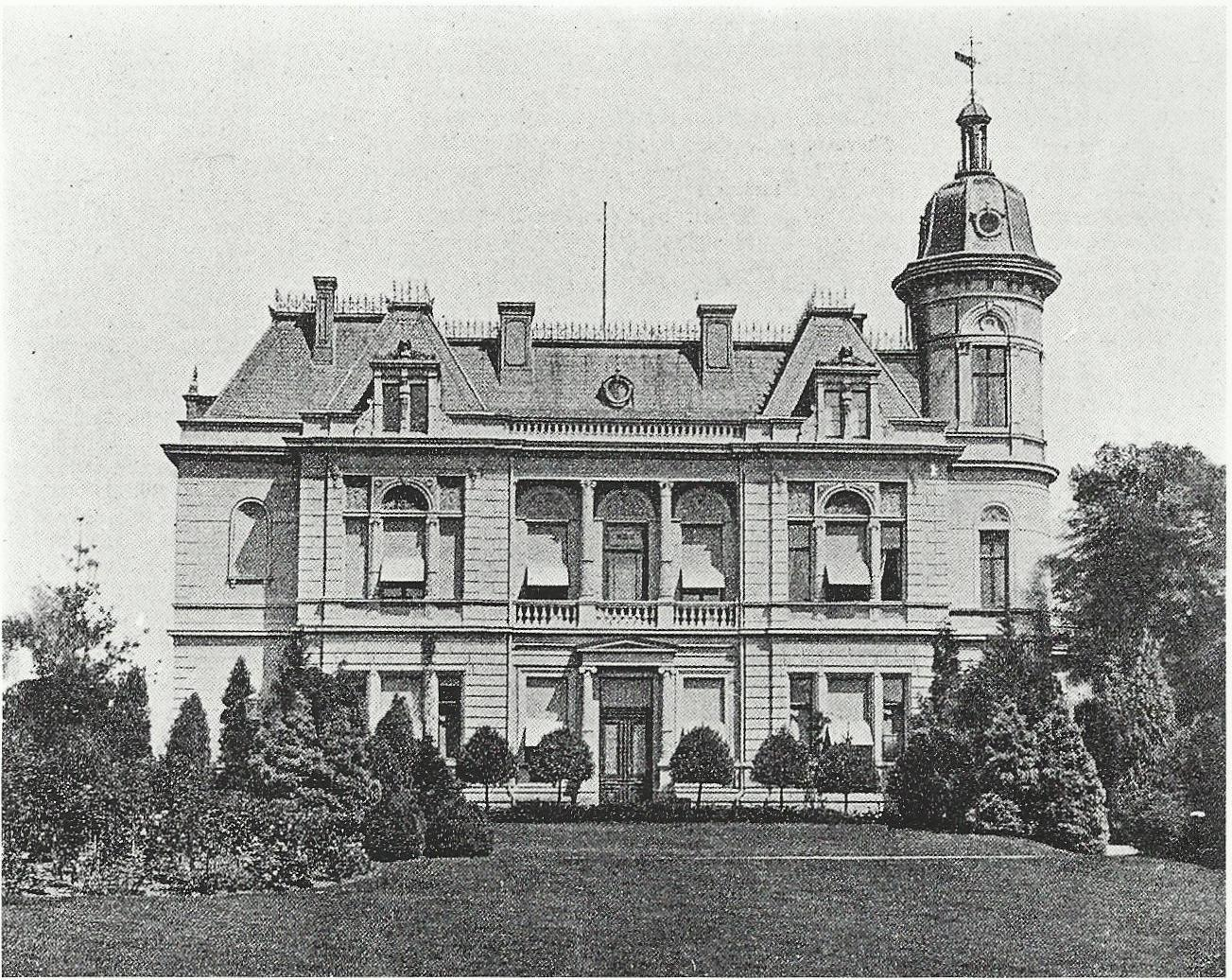 Kronprinzenvilla (1952/53 abgebrochen), Bonn: Straßenansicht